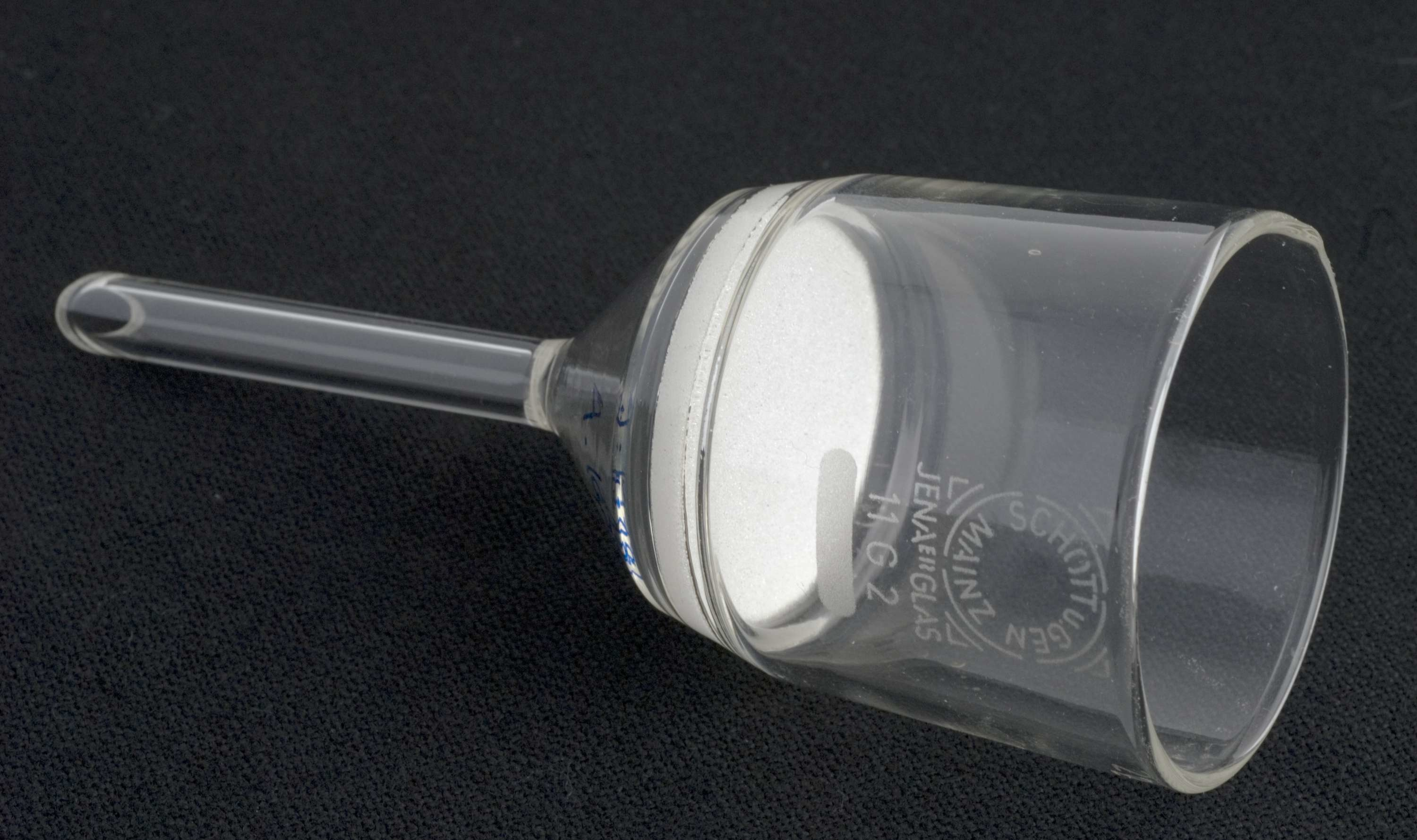 Filter. Glassfilter, selve filteret er av porselen.